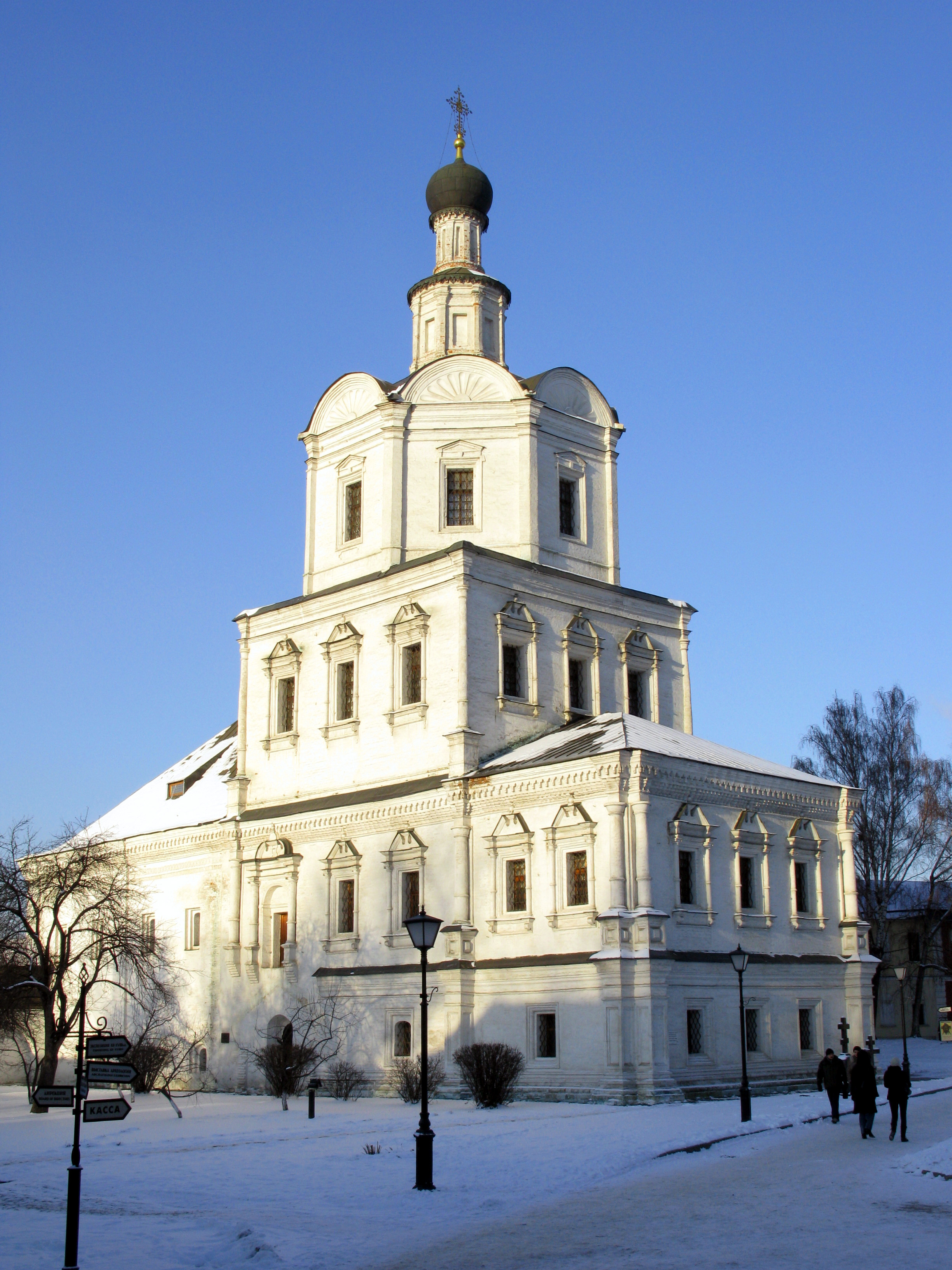 Храм Архангела Михаила и Алексия митрополита Московского (Андроников монастырь)